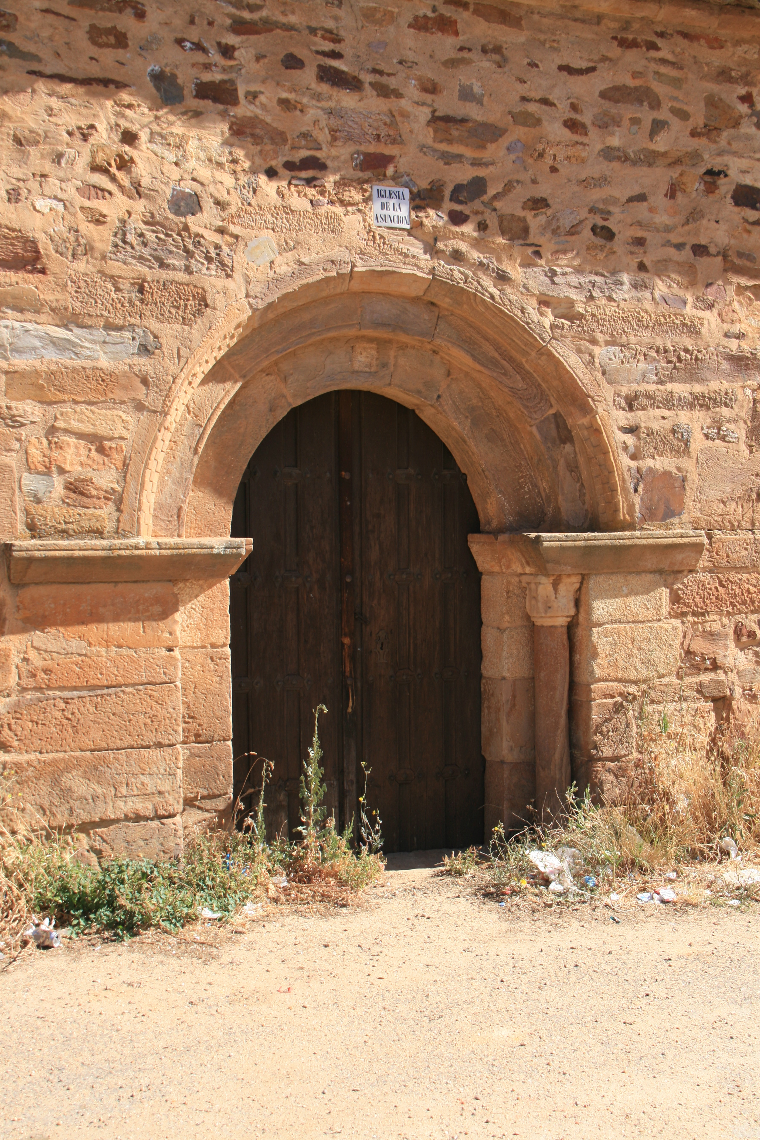 Portada de San Salvador de Tábara (Zamora)